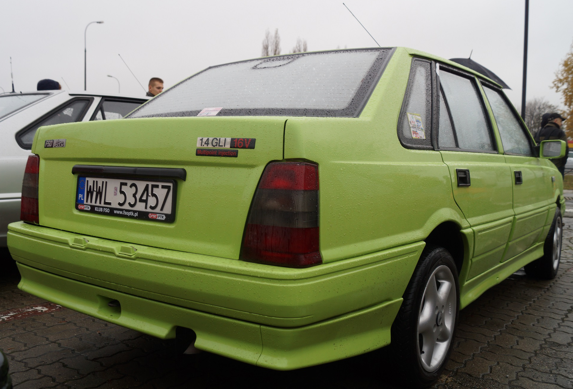 FSO Atu 1996r